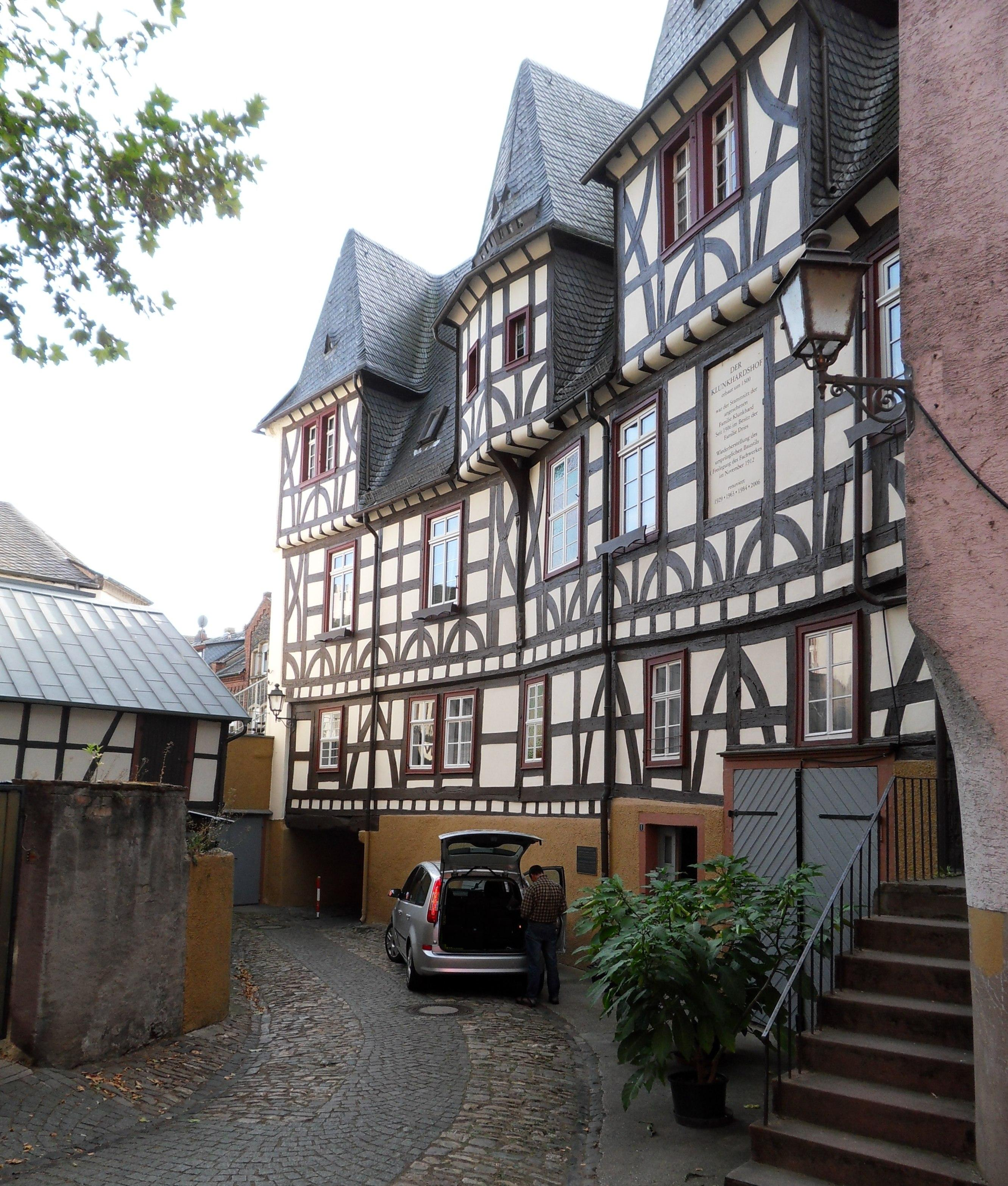 Der Klunkhardshof, das um 1500 erbaute Fachwerkwohnhaus der Patrizierfamilie Klunkhard in Rüdesheim am Rhein. Inschrift am Obergeschoss. Im Hintergrund der ebenerdige Durchgang zur Löhrstraße